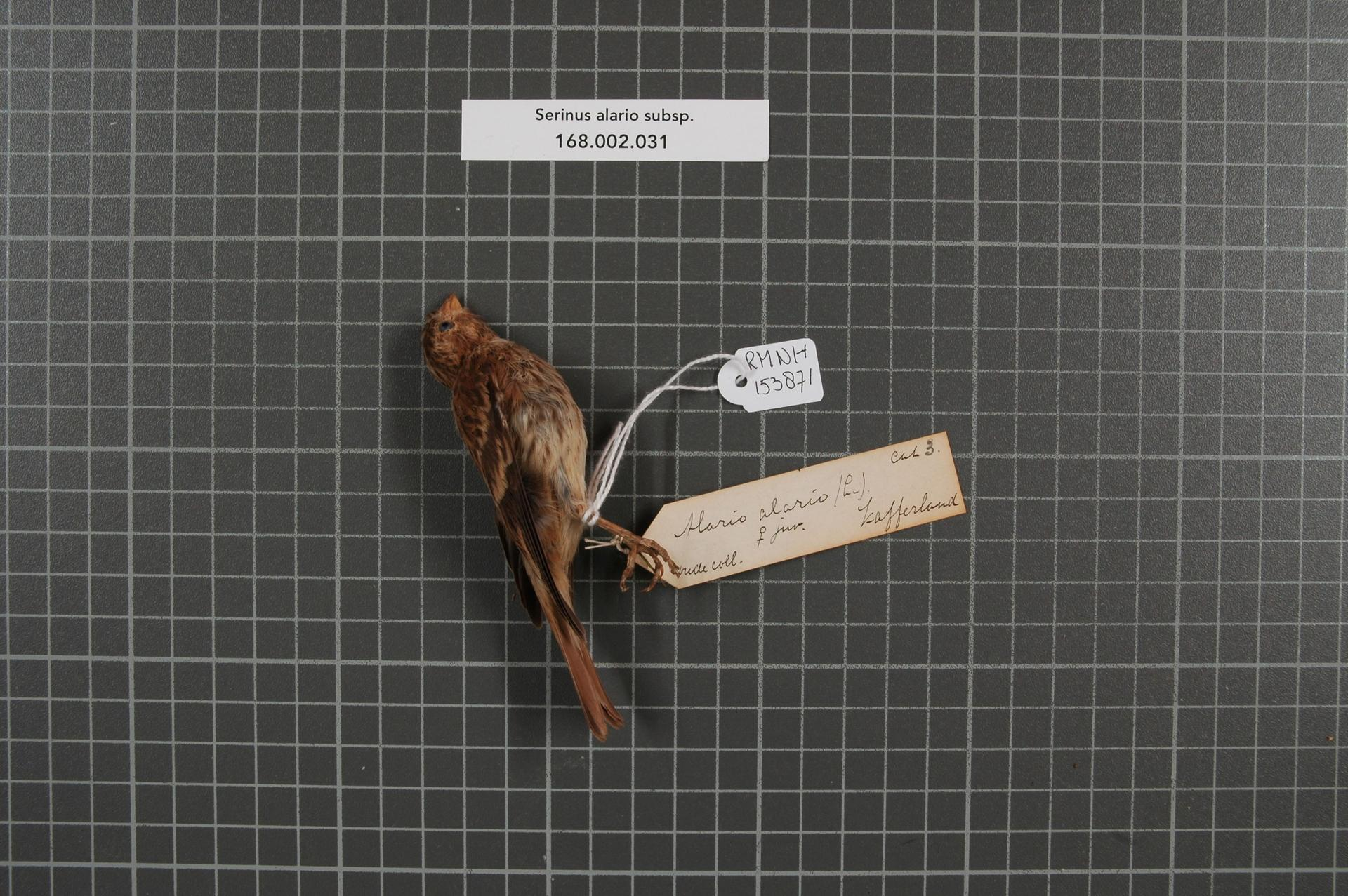 Serinus alario subsp.